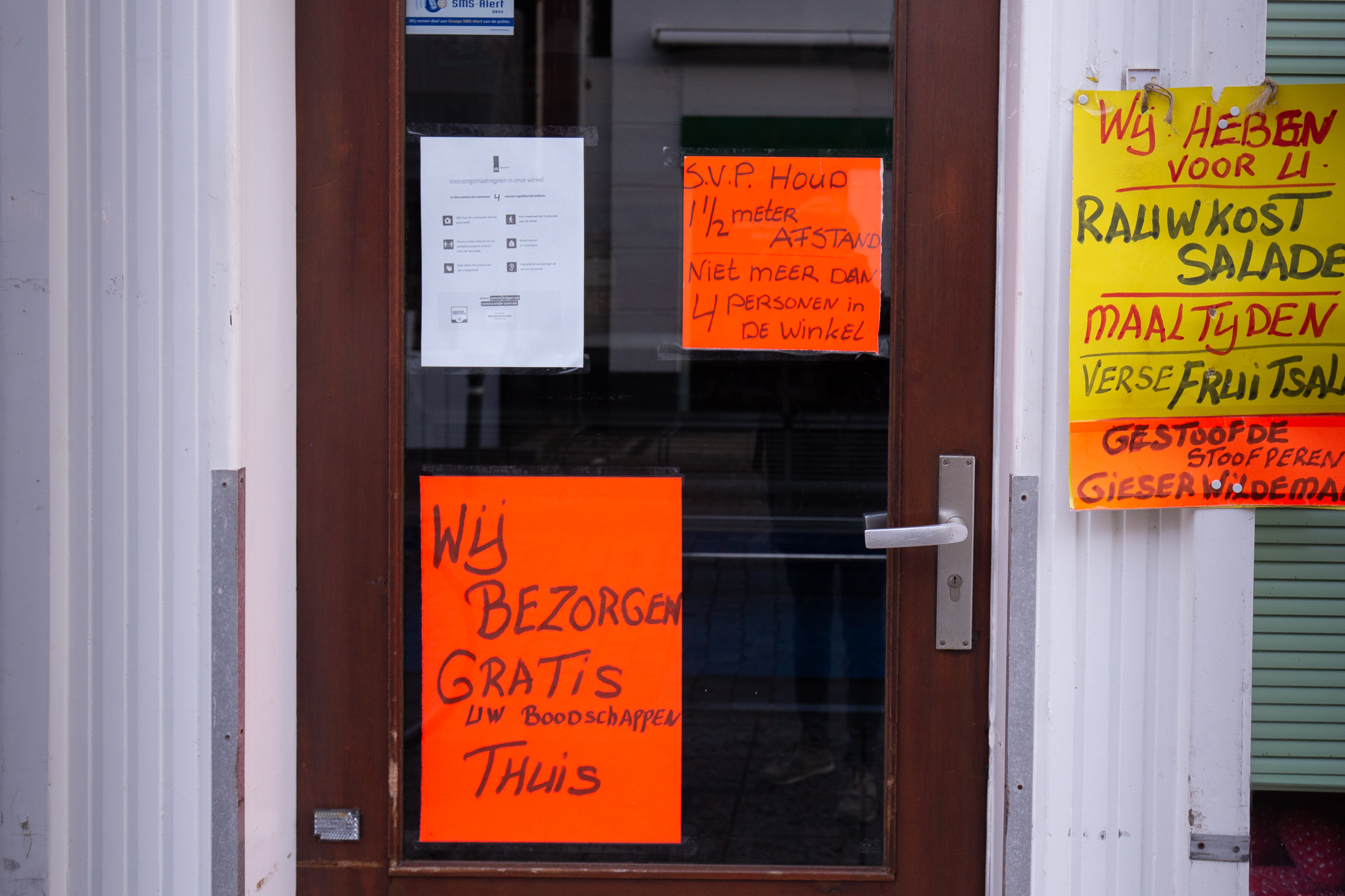 Maatregelen vanwege het coronavirus, gefotografeerd in maart 2020 bij een deur van een groentewinkel in een winkelstraat van Elburg